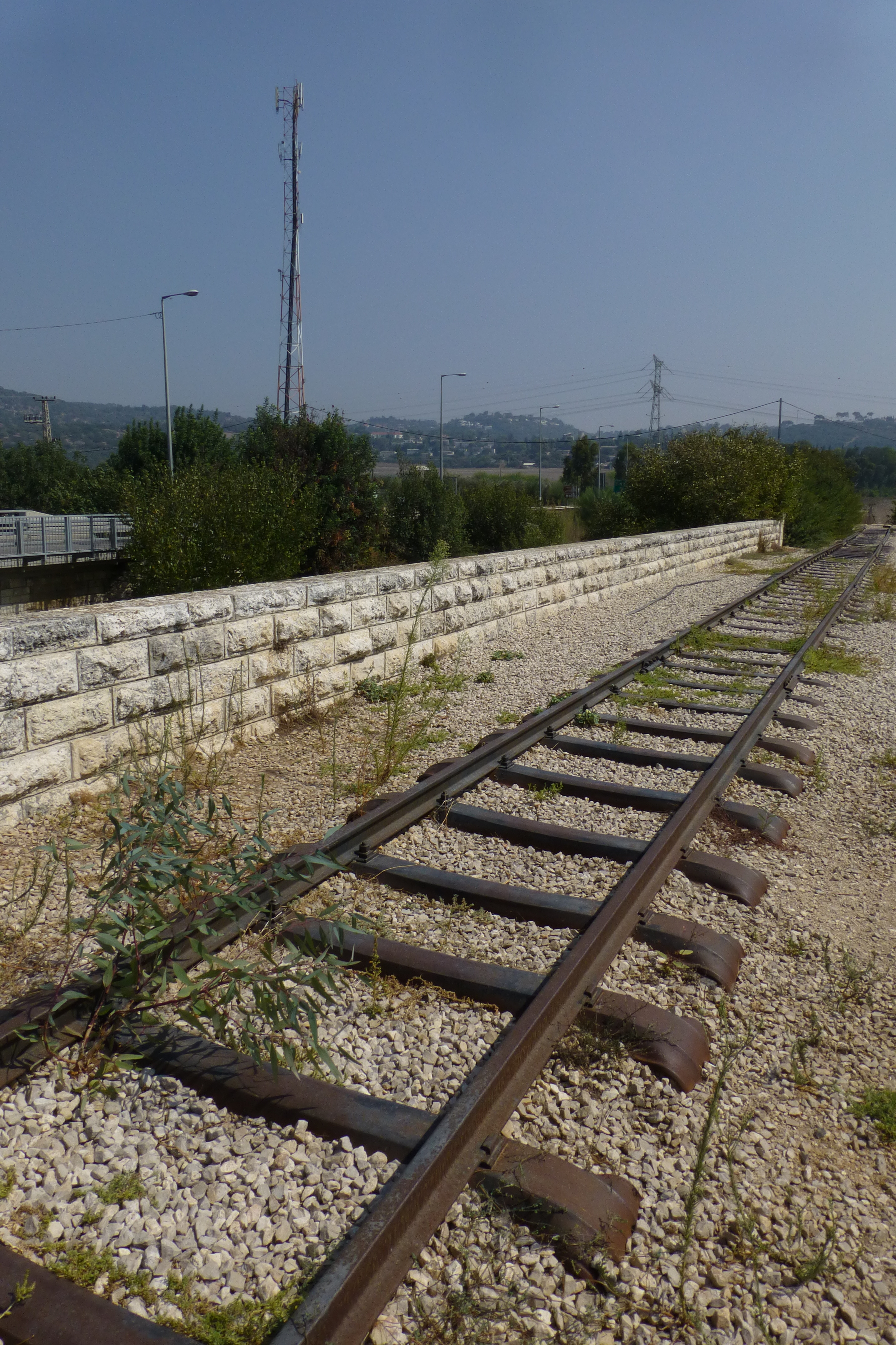 רכבת העמק - מעבירי מים והסוללה - צומת העמקים